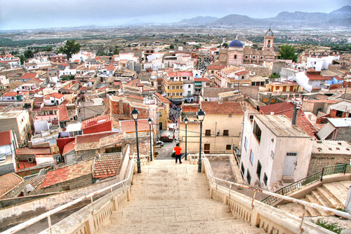 Panoramica de Abanilla